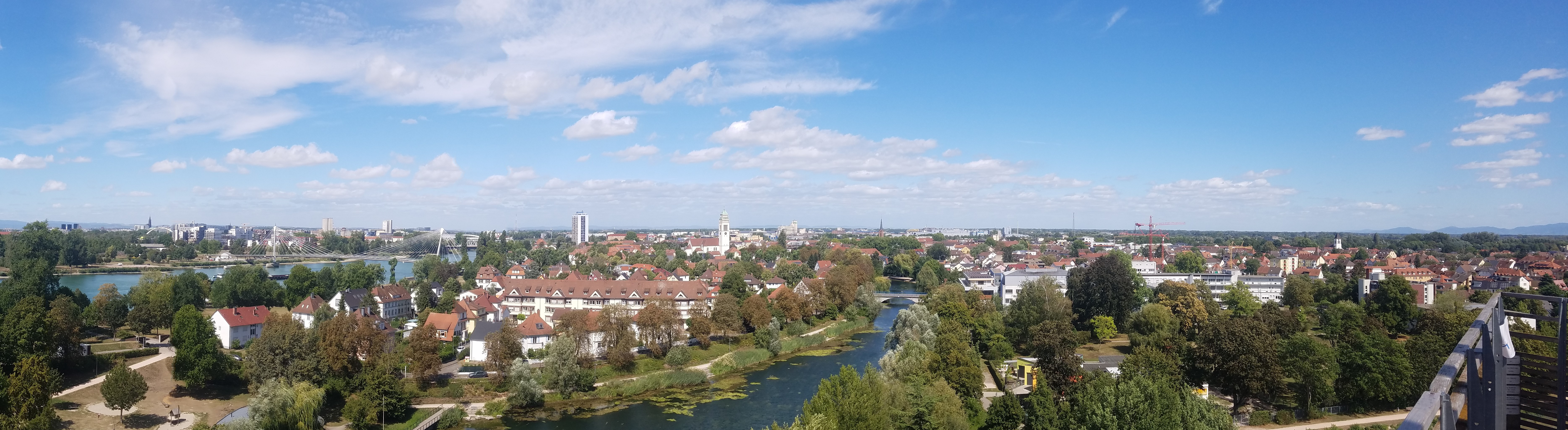 Panorama vom Weißtannenturm in Kehl mit Blick auf Straßburg und Kehl